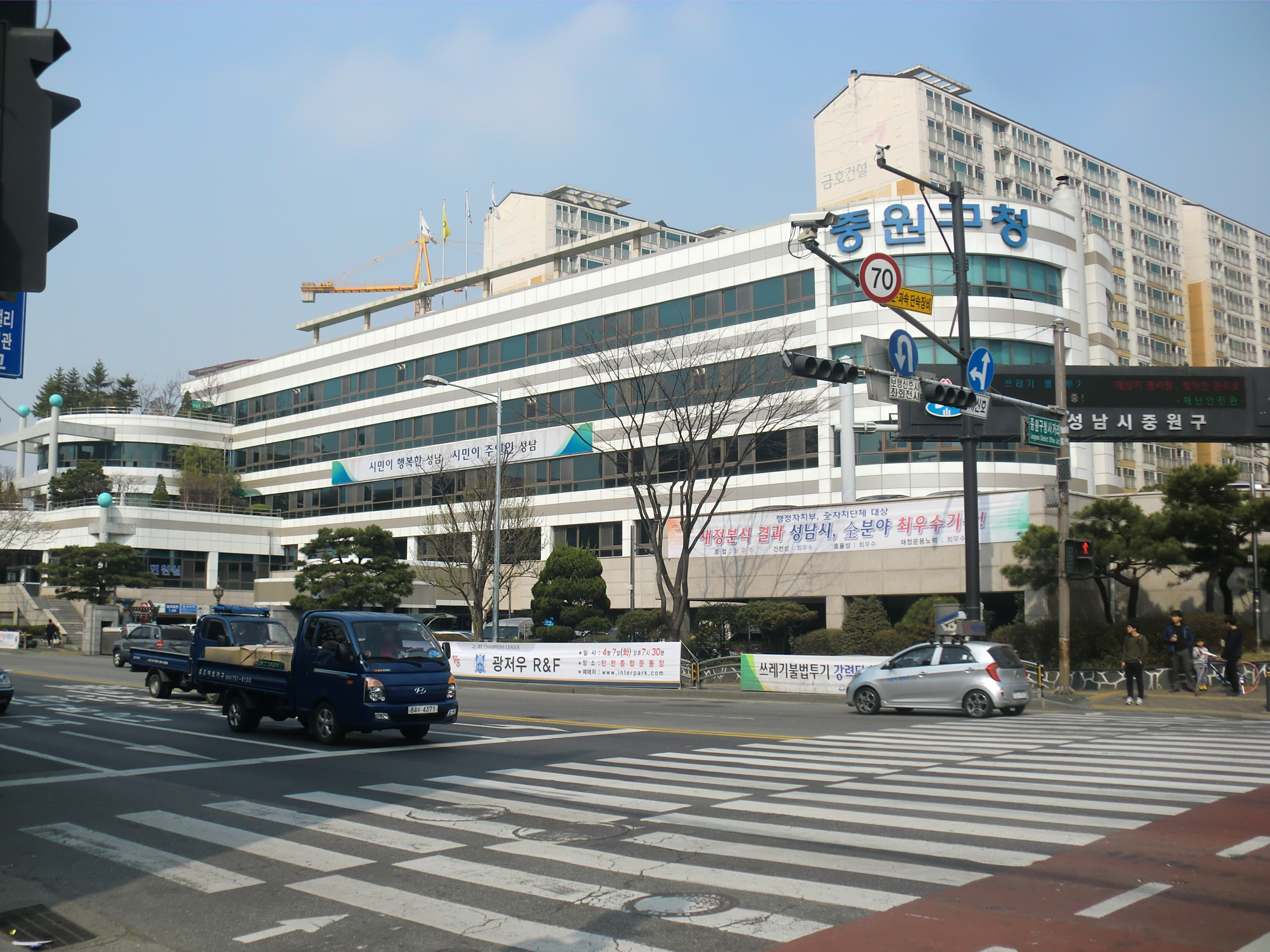 경기도 성남시에 있는 중원구청